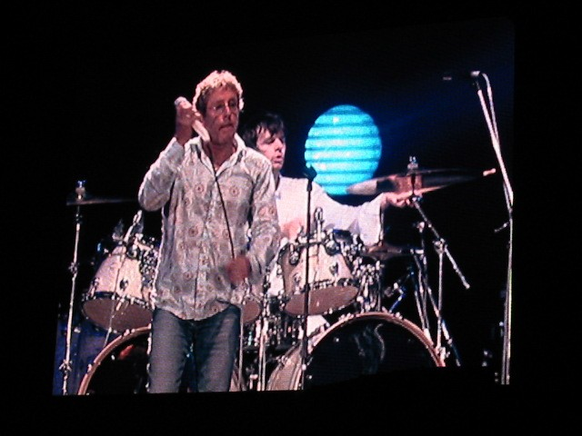 foto van Roger Daltrey, gemaakt op 30-06-2006 op Rock Werchter, in Werchter. gemaakt door mijzelf: Joep Vullings